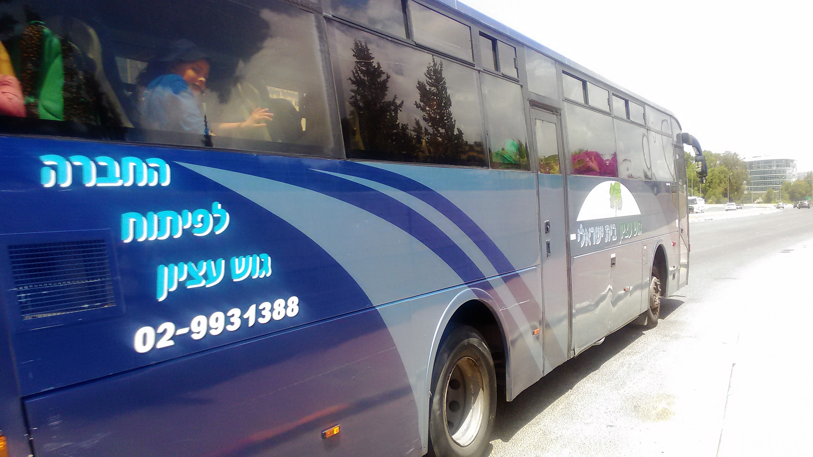 אוטובוס של החברה לפיתוח גוש עציון